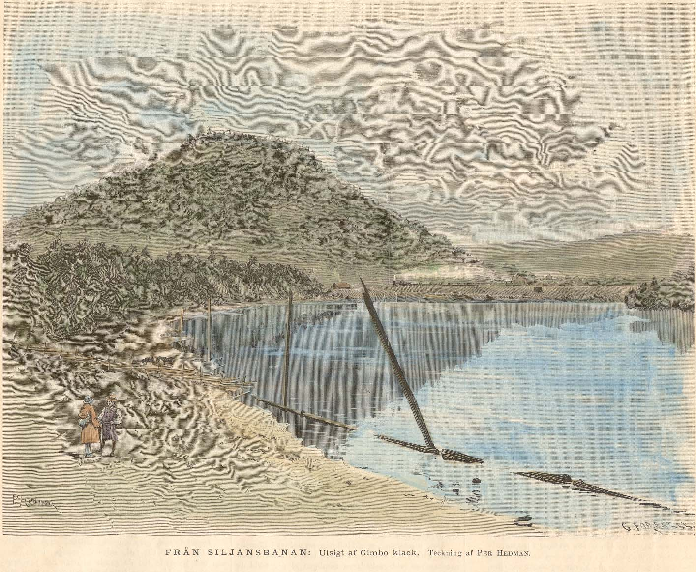 "Från Siljansbanan: Utsigt af Gimbo klack. Teckning af Per Hedman." Handkolorerat autotypitryck visande Gimklack med vattenspegel framför och ångtåg där mellan.